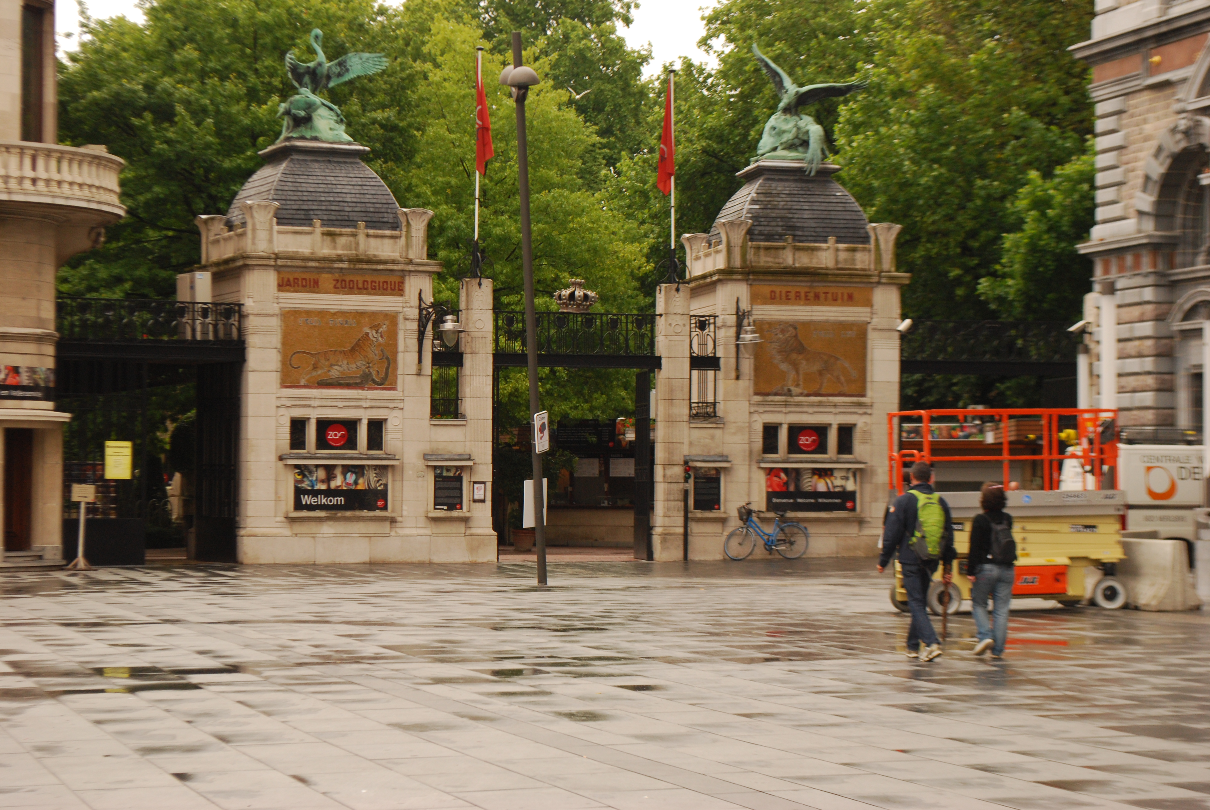 Entrée du Zoo d'Anvers sur la place Reine Astrid.